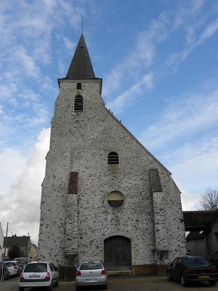 Église de Villeneuve-Saint-Denis (77).